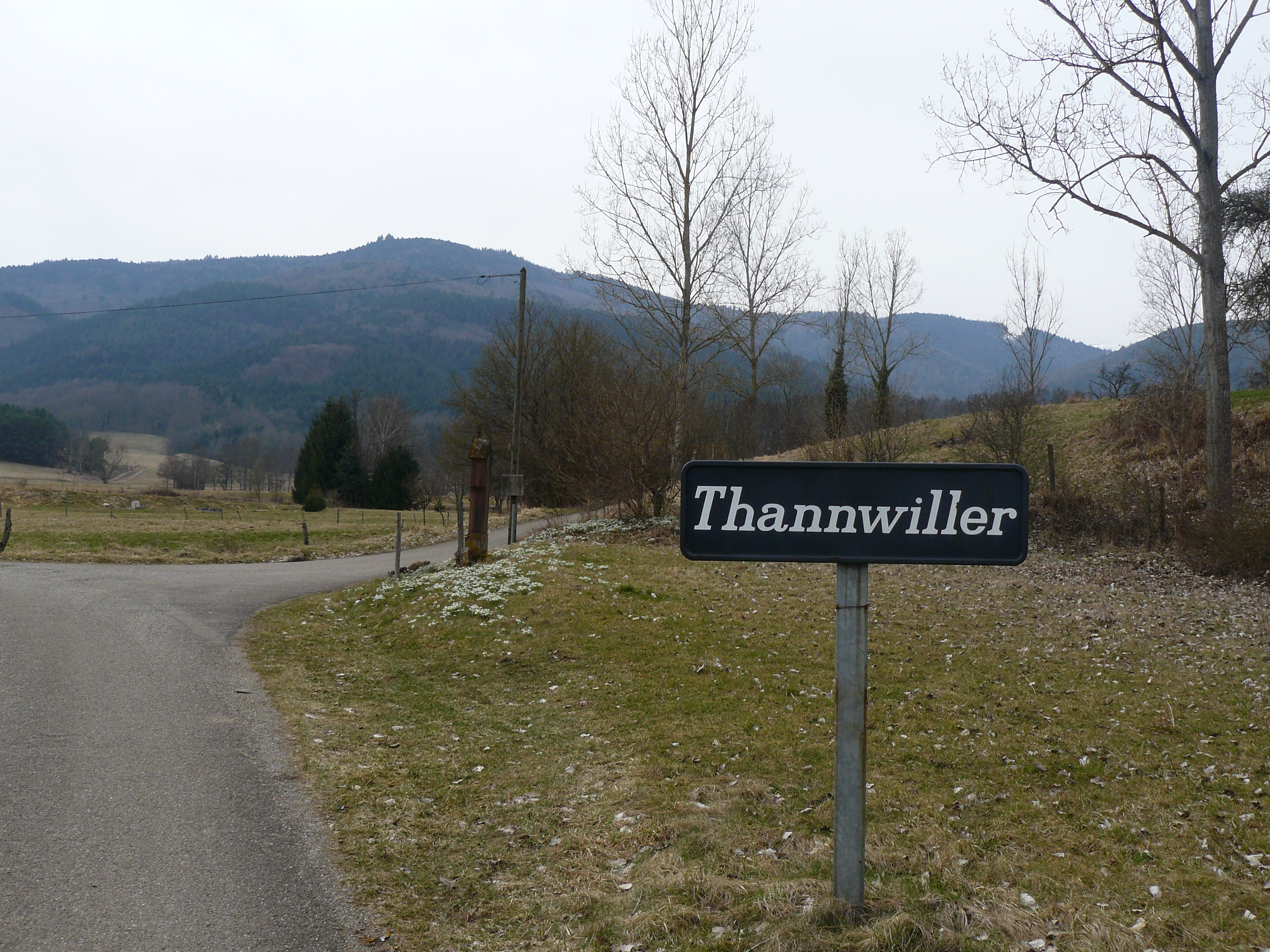 Le hameau de Thannwiller à Soultzmatt